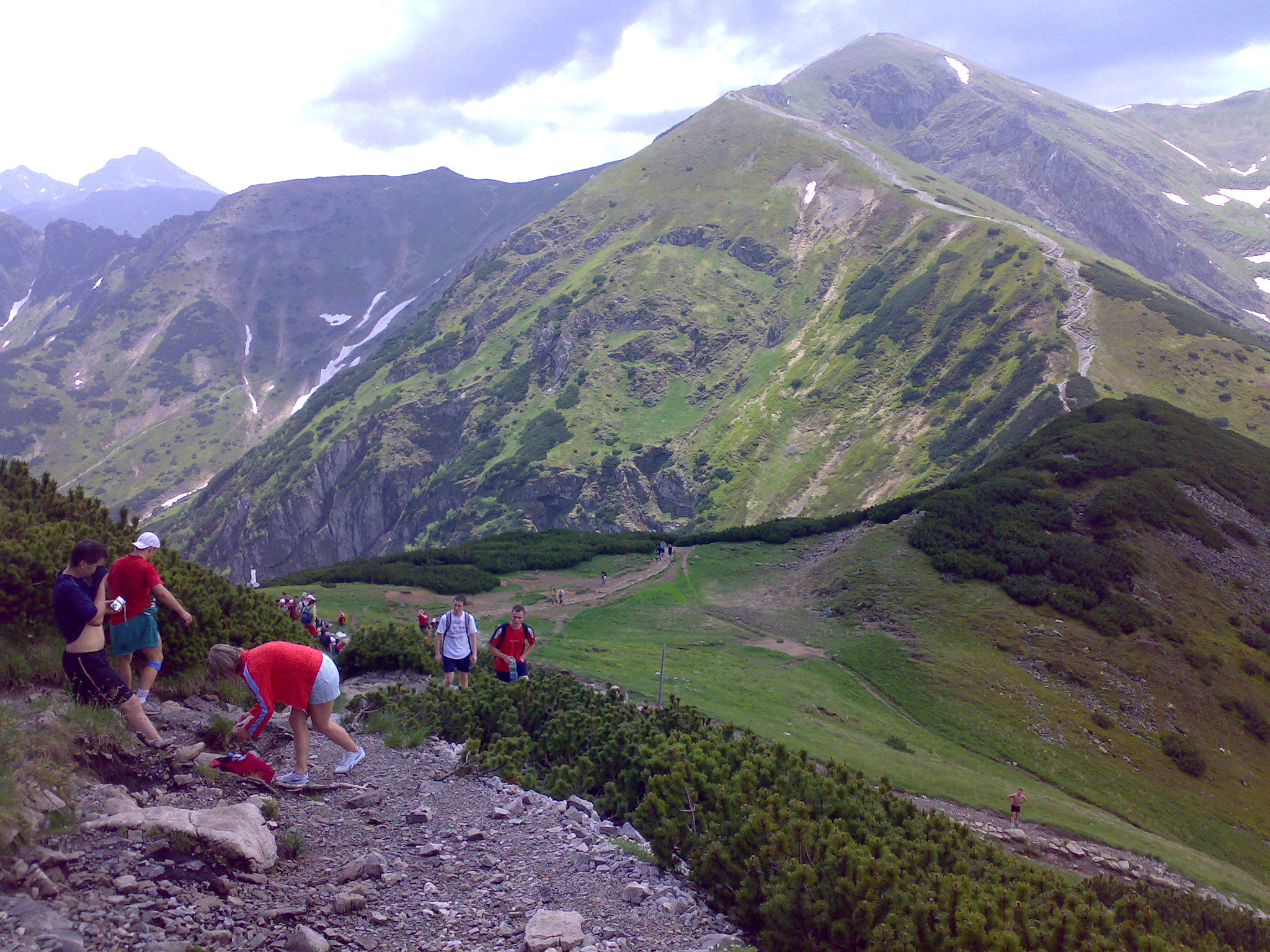 widok na Kondracką Kopę